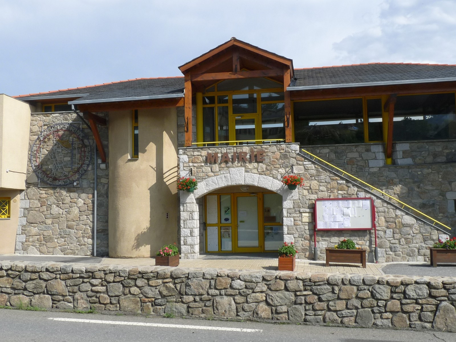 Mairie d'Angoustrine-Villeneuve-des-Escaldes, Pyrénées-Orientales, France